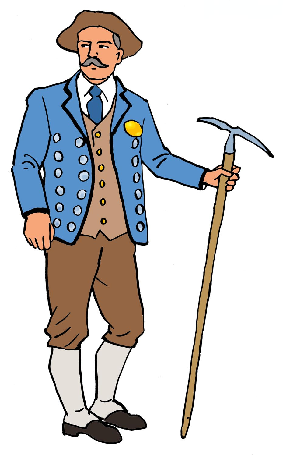 Guide de Cauterets, costume